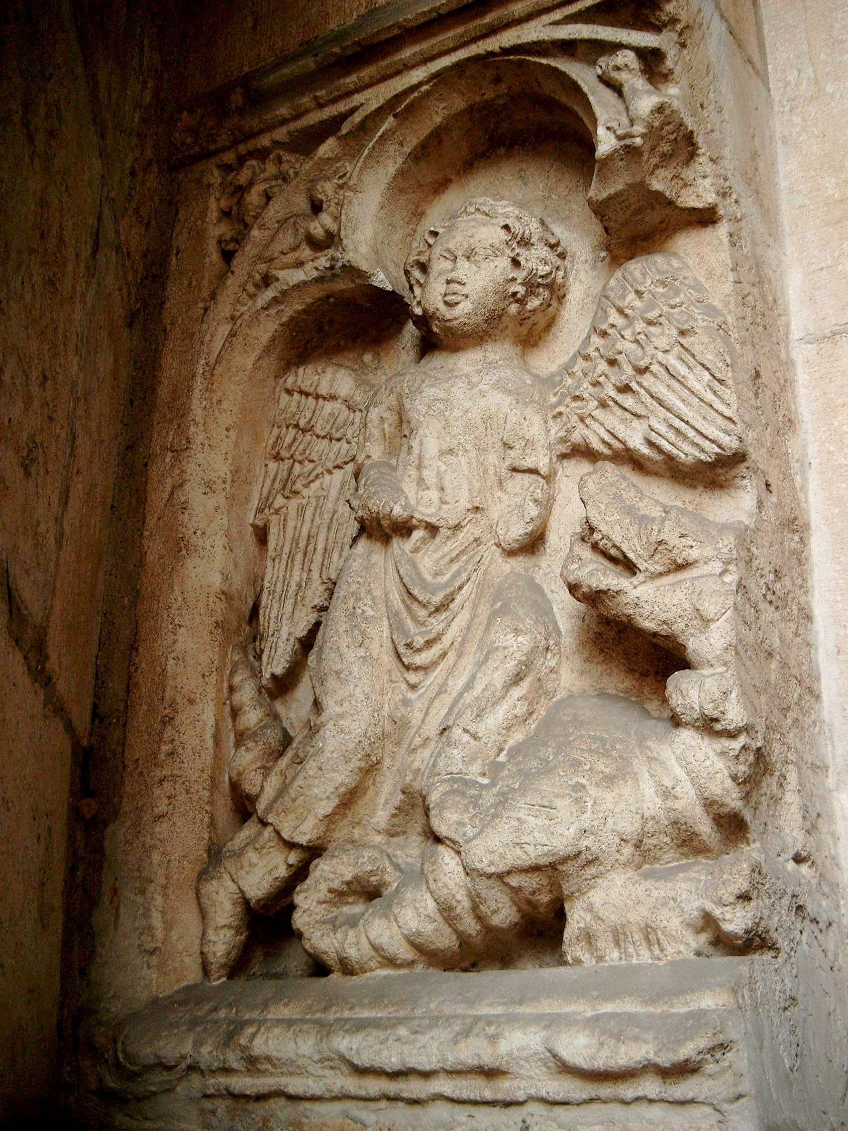 Rzeźba archanioła Michała przy wejściu do katedry wawelskiej